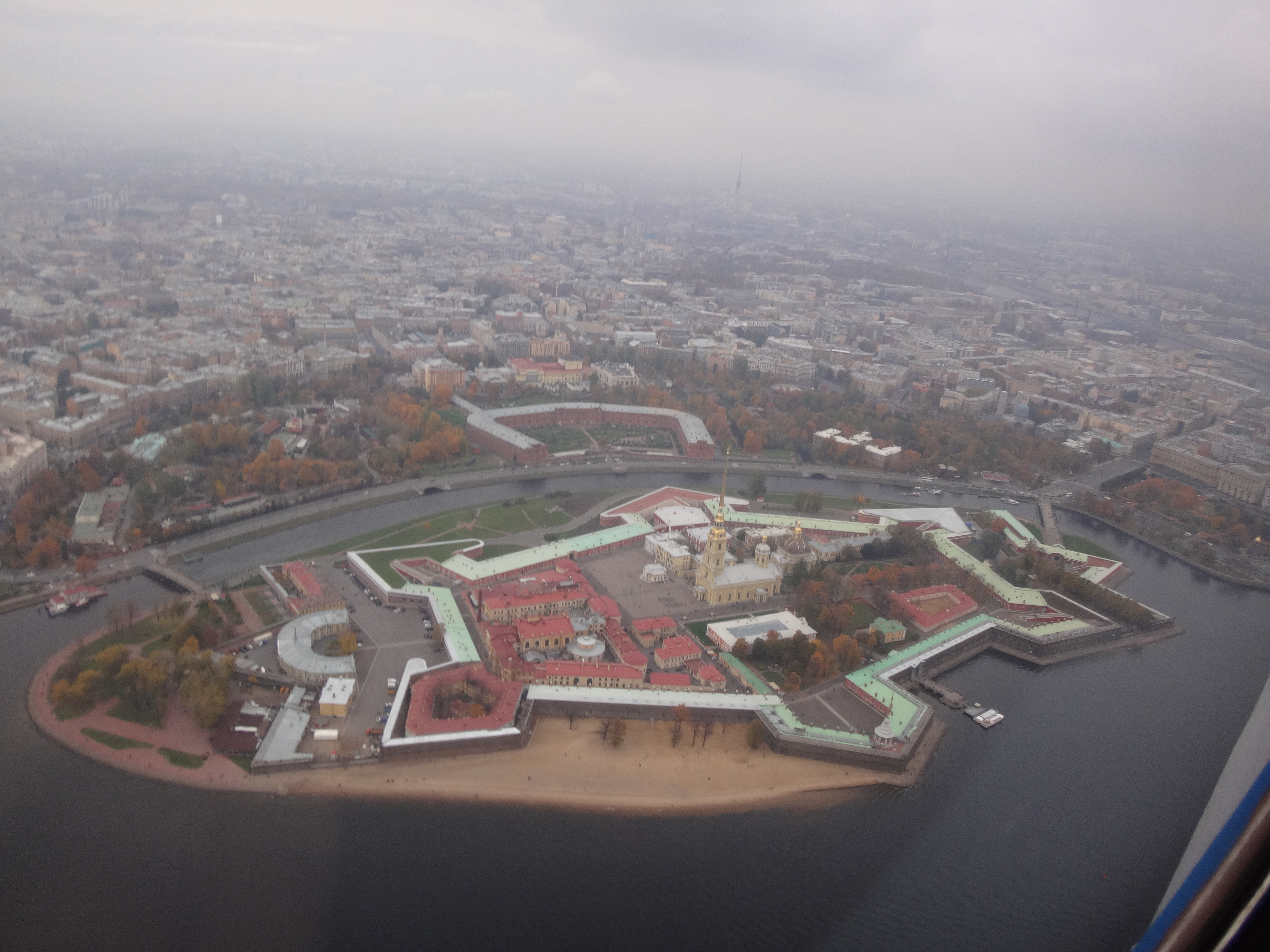 Петропавловка с высоты